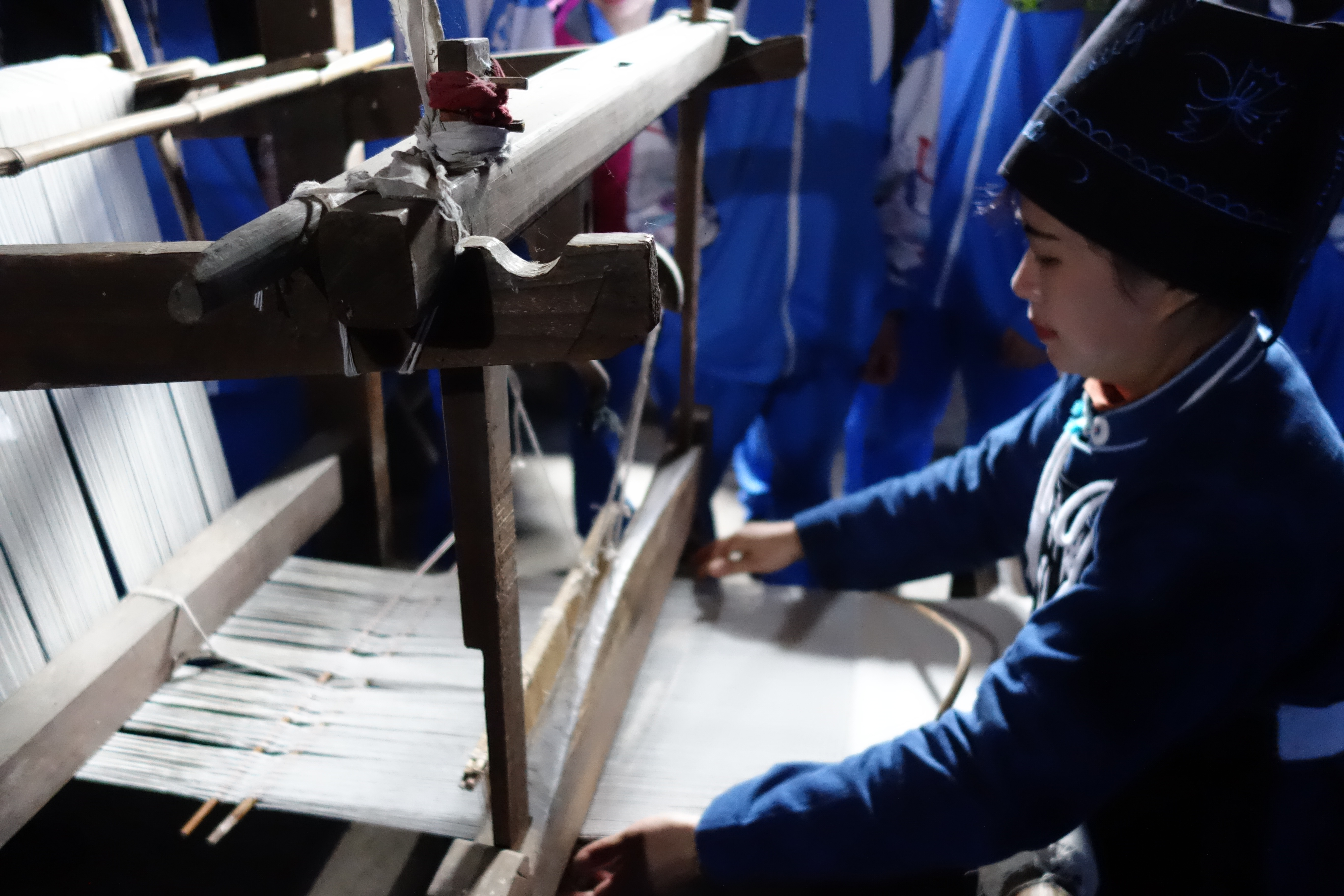 中文（中国大陆）: 贵州省平塘县布依族村寨，当地村民演示梭织技术